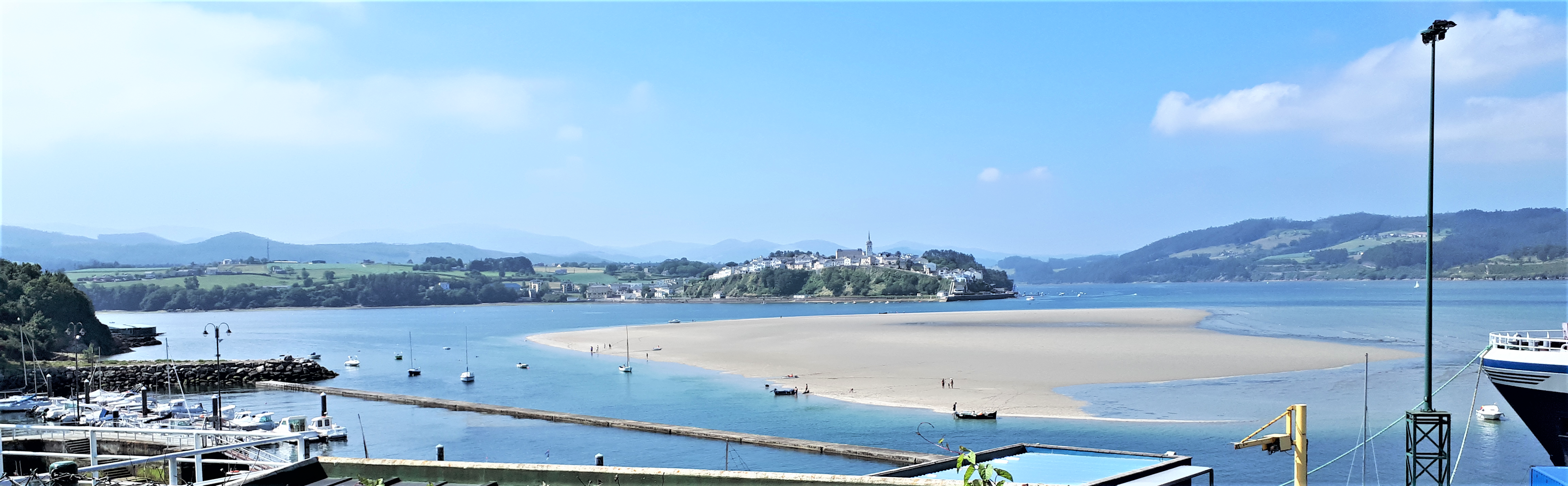 Playa El Tesón en la Ría del Eo costa de Figueras (Asturias - España). Al fondo se observa la ciudad de Castropol. This is a photography of a Special Area of Conservation in Spain with the ID: ES1200016. Natura2000 entry, EEA entry